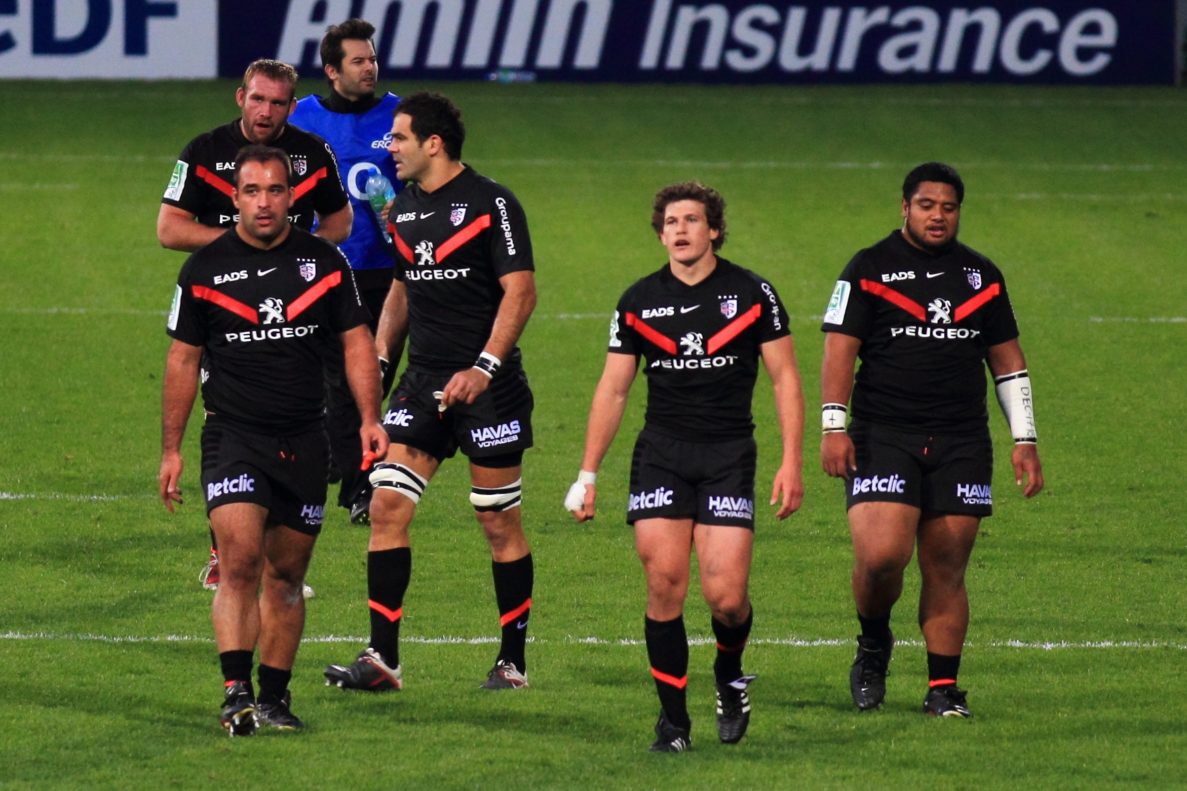 Heineken Cup — 13 November 2011, Stade Ernest Wallon. Match between: Stade toulousain — Gloucester Rugby